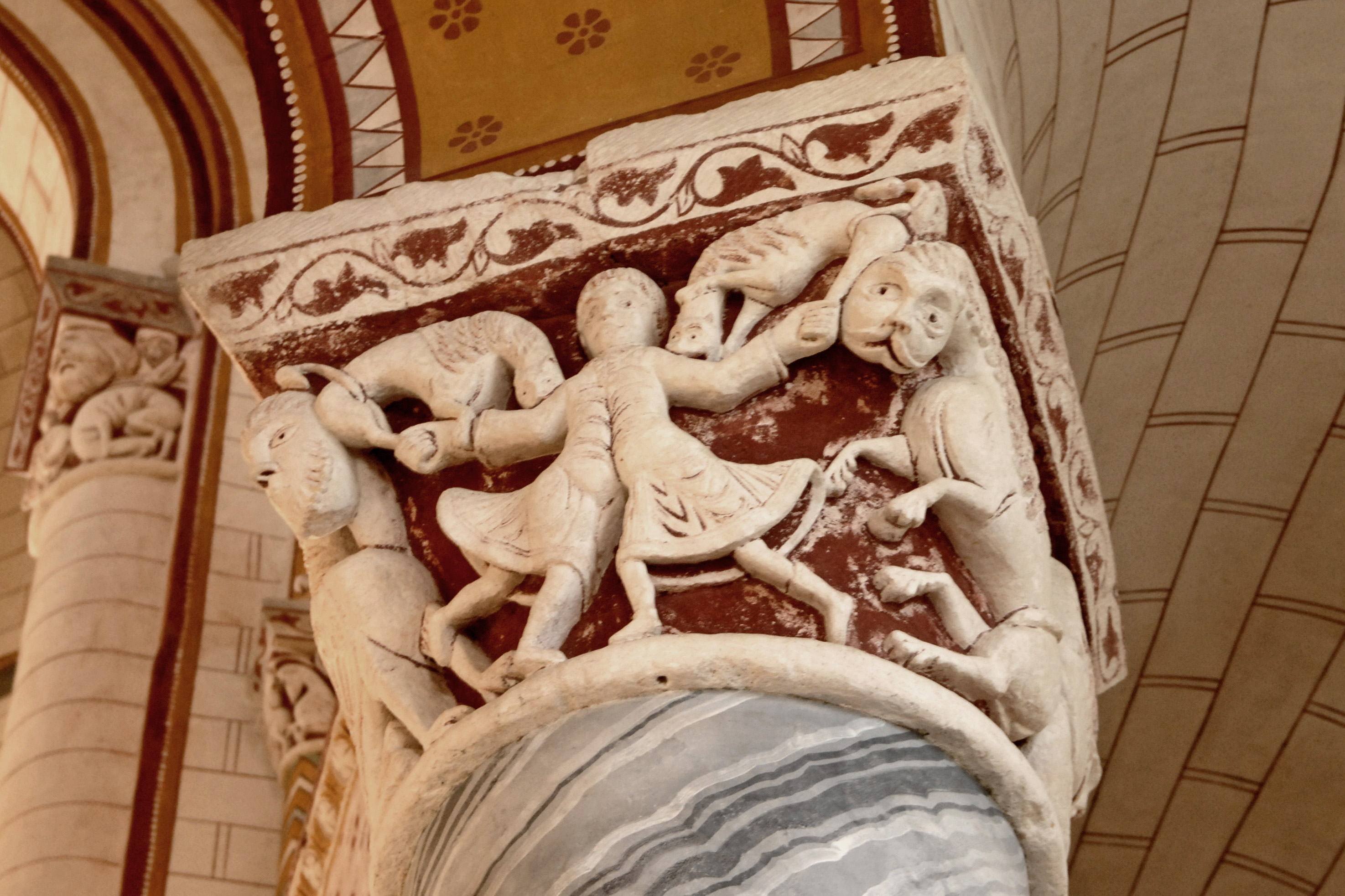 Kapitell VI